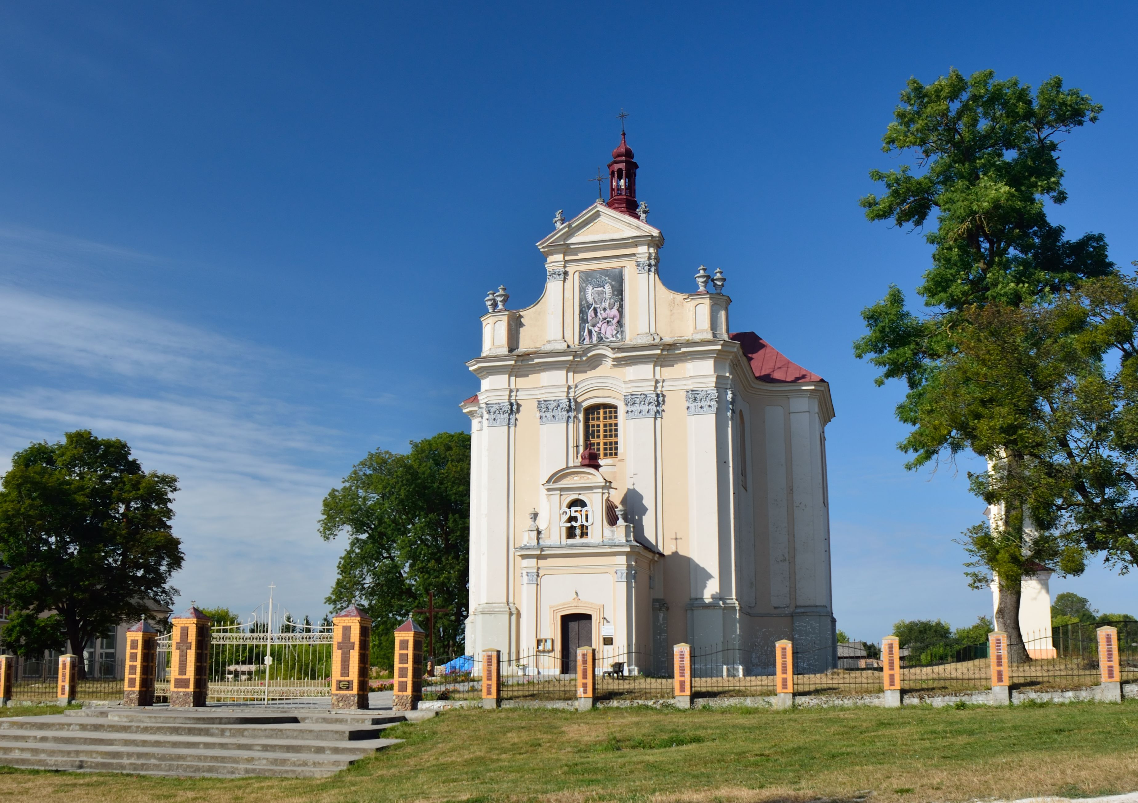 Костел Непорочного Зачаття Діви Марії (мур.), смт.Лопатин